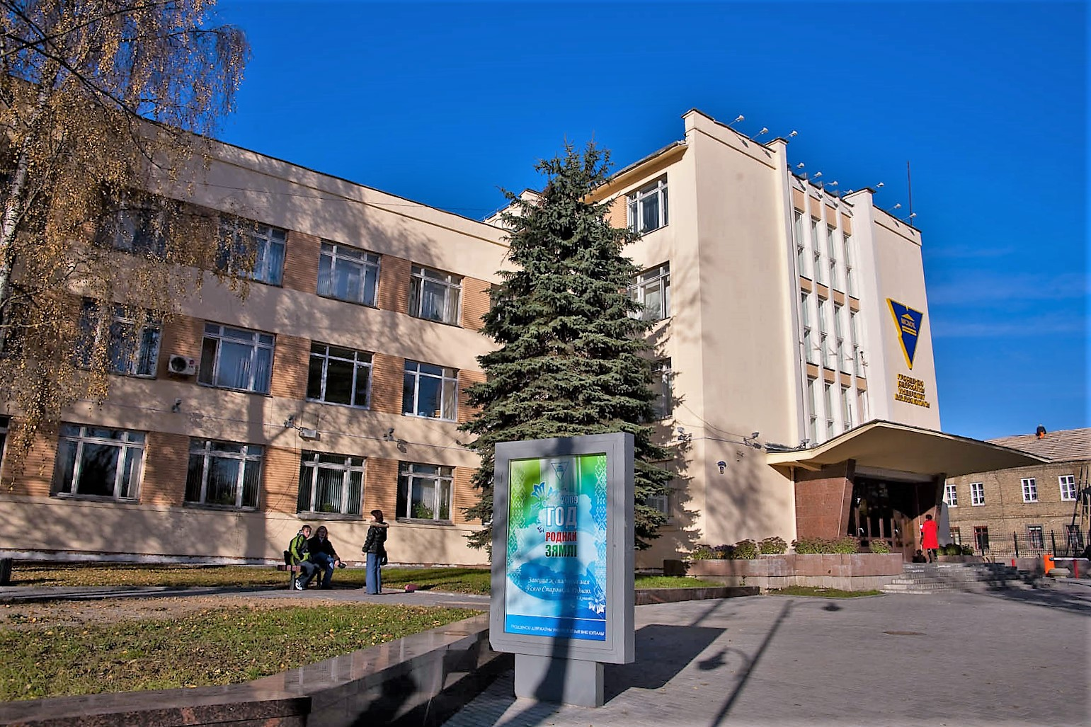 Правая часть здания №22 по ул. Ожешко, Гродно, Беларусь. Здание является учебным корпусом №1 ГрГУ им. Янки Купалы. В здании также размещается Гродненское региональное отделение Республиканского центра трансфера технологий (РЦТТ). Здание №22 по ул. Ожешко входит в Застройку ул. Ожешко как историко-культурной ценности, описанной в Государственный список историко-культурных ценностей Республики Беларусь под номером 412Г000005. This is a photo of Belarusian heritage monument. Reference number: 412Г000005 ( WLM) Здание размещается на площади, которая попадает в описанную в Государственном списке историко-культурных ценностей Республики Беларусь площадь Исторического центра Гродно (номер 411Е000002). This is a photo of Belarusian heritage monument. Reference number: 411Е000002 ( WLM)